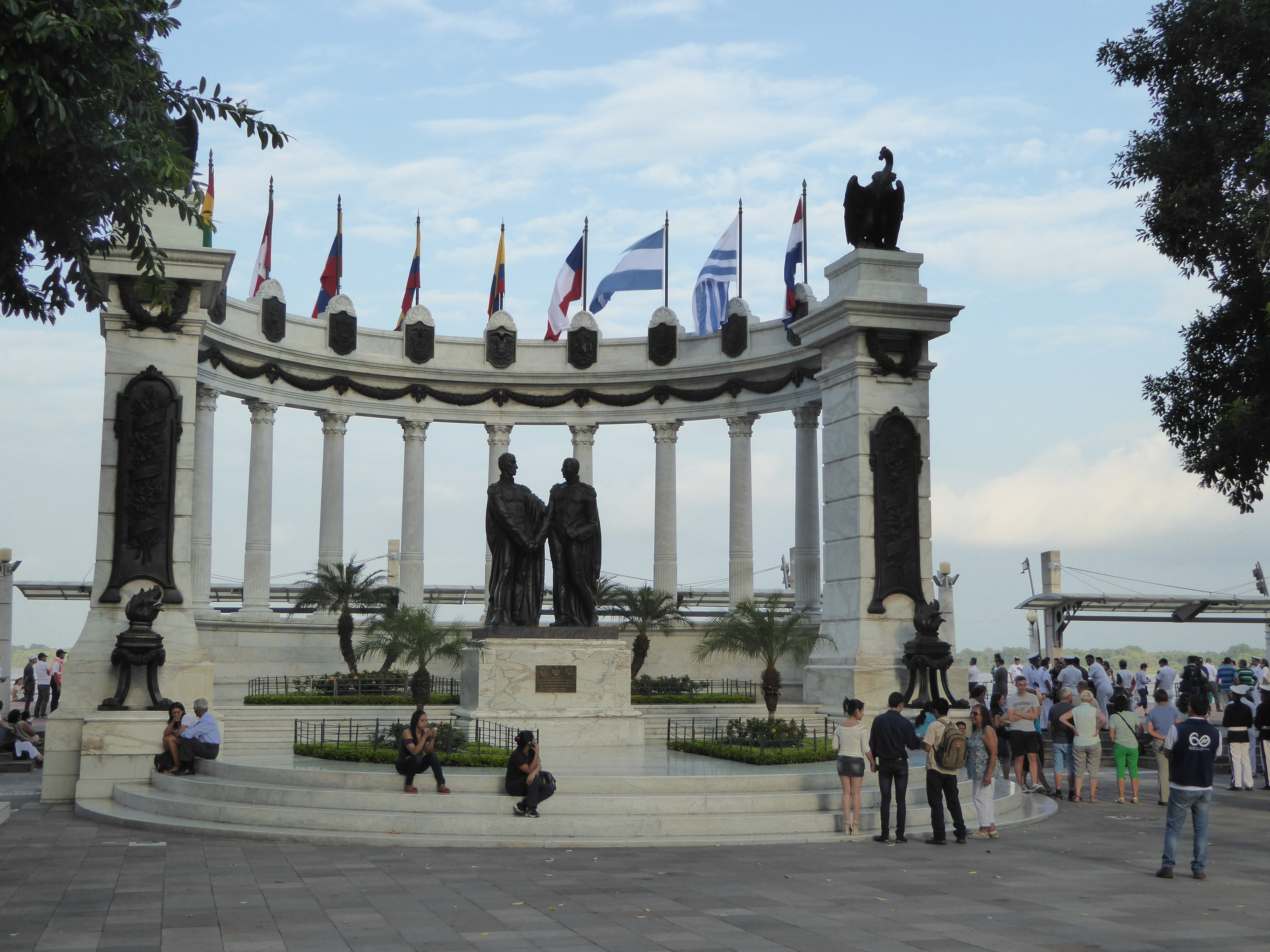 Hemiciclo de la Rotonda